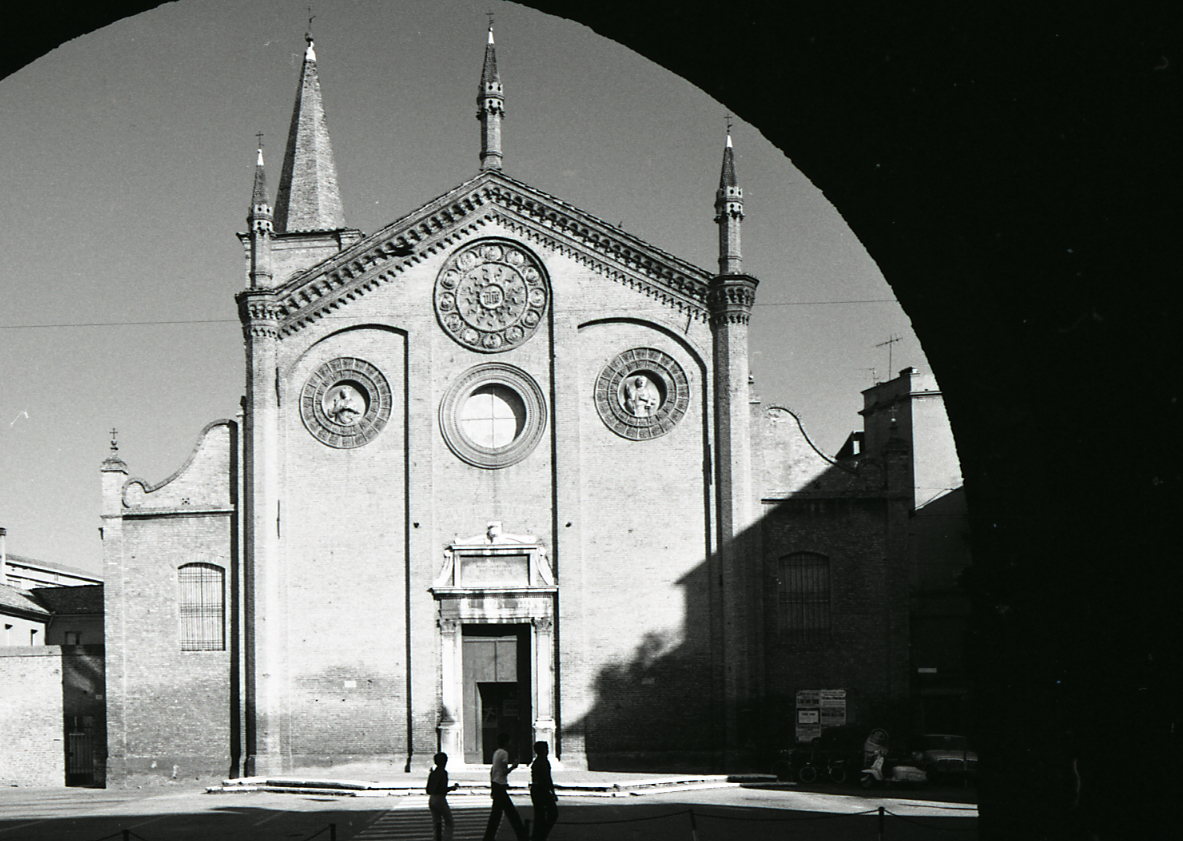 Servizio fotografico : Ferrara, 1974 / Paolo Monti. - Strisce: 7, Fotogrammi complessivi: 37 : Negativo b/n, gelatina bromuro d'argento/ pellicola ; 35 mm. - ((Sul portanegativi: N[I]K[MA]T FP4. - (3):. - 1A-6A; 34A-37A = vedute urbane;. - 7A-20A; 32A-33A = Chiesa;. - 21A-28A = portici e particolari architettonici e decorativi. - Occasione: Documentazione del centro storico. - Fonte: Fattura di Paolo Monti: IV. Commesse/ Fattura n. 18/ Riprese fotografiche del centro storico (Mostra Vitalità del centro storico) (1974/10/16), presso Archivio Paolo Monti. - Fonte: Agenda di Paolo Monti: Leica 1501-3000 Controllo numerazione (1950-1978), presso Archivio Paolo Monti